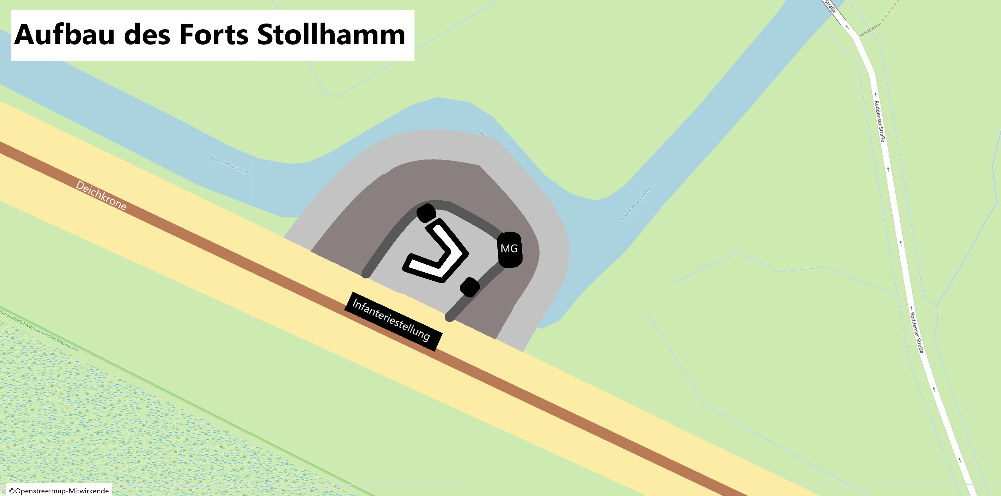 Aufbau des Forts Stollhammerdeich, nach: Frank Gosch: Festungsbau an der Nordsee und Ostsee. Die Geschichte der Deutschen Küstenbefestigungen bis 1918. 1. Auflage. Mittler, Hamburg / Berlin / Bonn 2003, ISBN 3-8132-0743-9, S. 59.